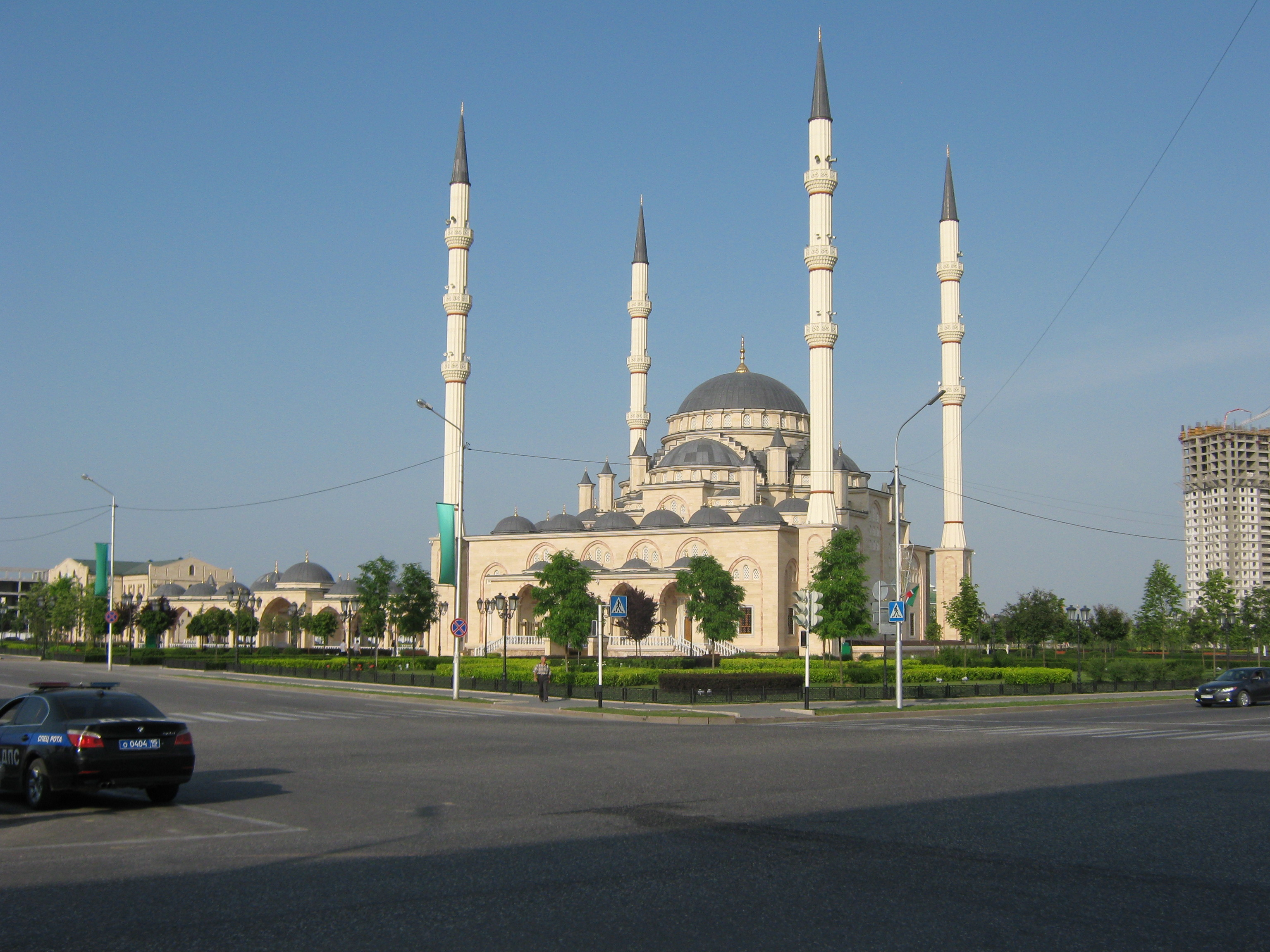 Мечет имени Ахмада Кадырова в Грозном мечеть-/ Чечня, самая большая мечеть в России и на европейском континенте.